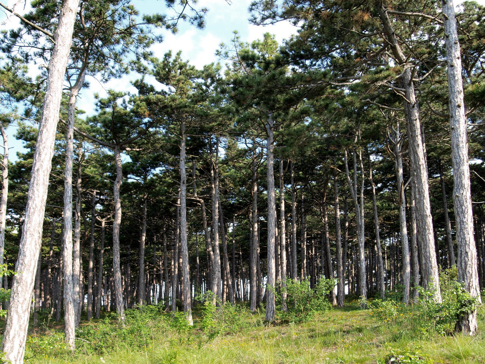 Pinus nigra Waldrand am Sonnenweg in Bad Vöslau, Niederösterreich.